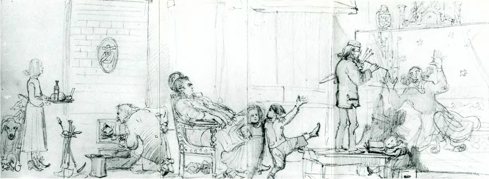 Autokarykatura, ok. 1872, rysunek satyryczny ołówkiem na papierze, 19x50, nie sygnowany, Muzeum Narodowe w Krakowie, Dom Jana Matejki, nr inw. IX/1018. Tematem rysunku jest Jan Matejko z rodziną podczas malowania obrazu Kopernika.